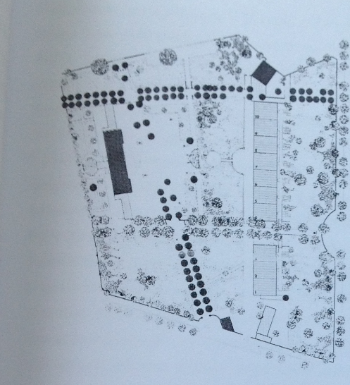 Prospetto degli studi degli artisti a Villa Massimo durante gli anni '50